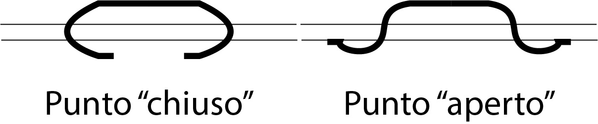 Schema punti metallici per cucitrici